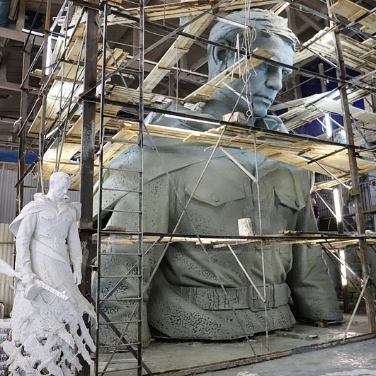 Ржевский мемориал советскому солдату. Верхняя часть. Скульптор — Андрей Коробцов, архитектор — Константин Фомин. 2019 г.